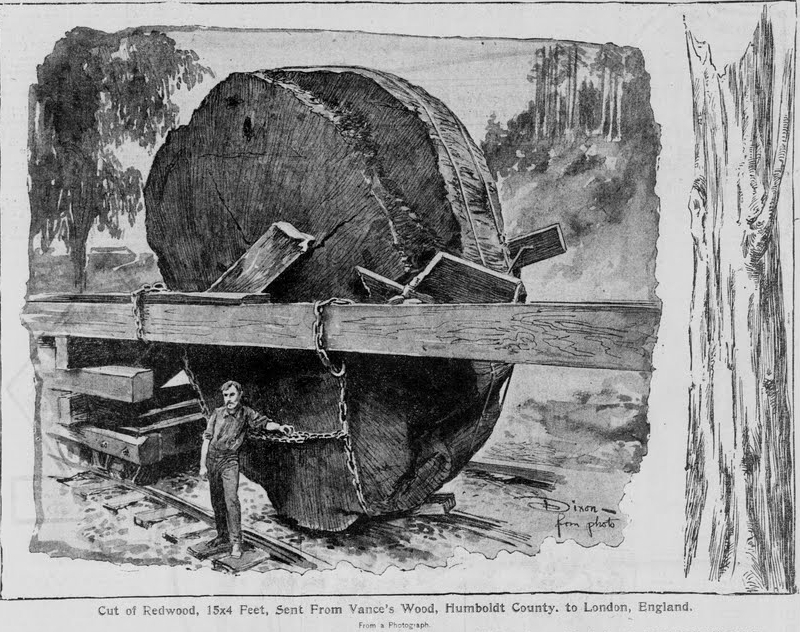 Section of a Californian redwood in Cliveden